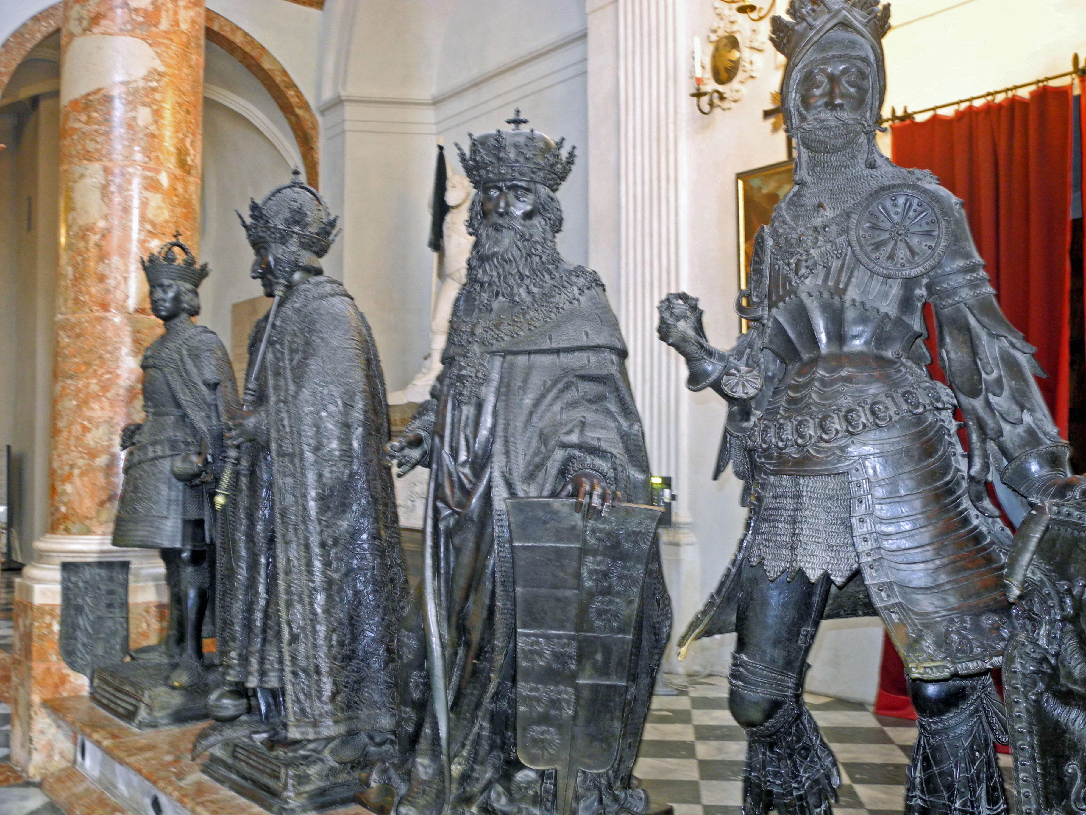 Hofkirche zum hl. Kreuz mit Grabmal Maximilians I. und Silberner Kapelle